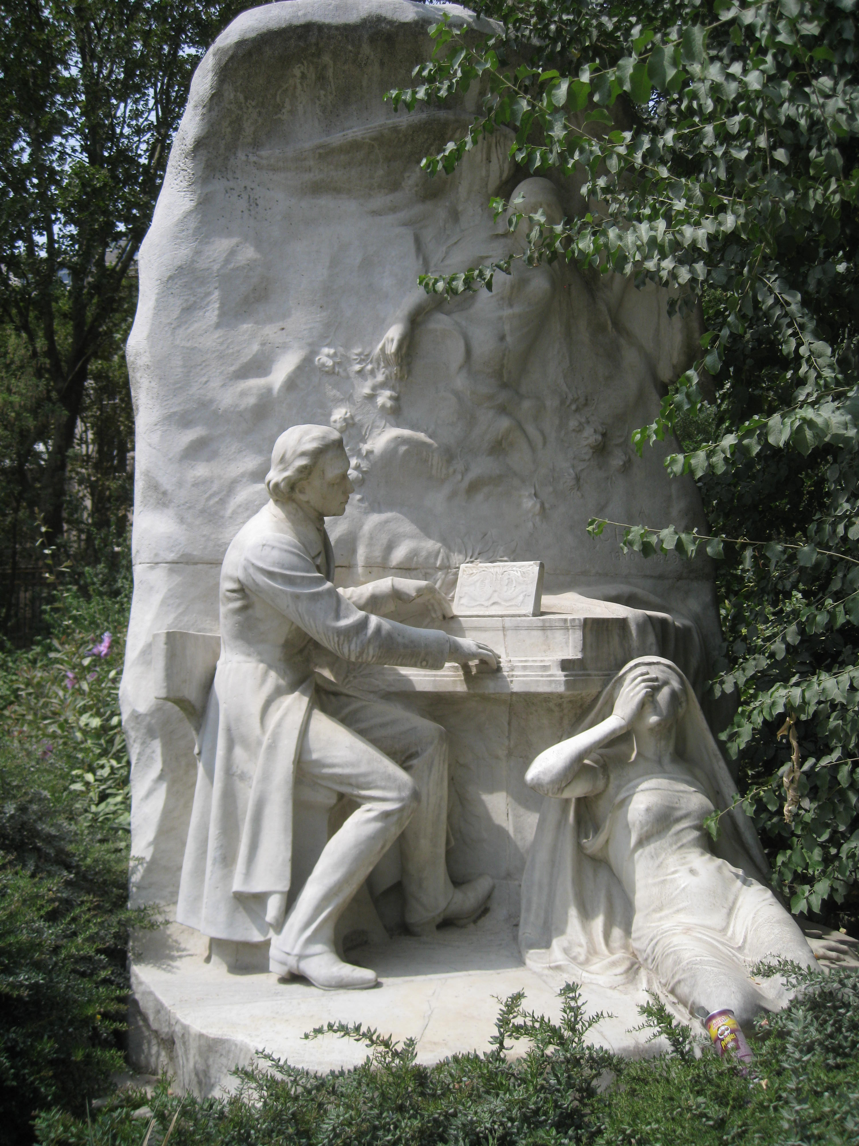 入口入って右側に進むと見つかります。